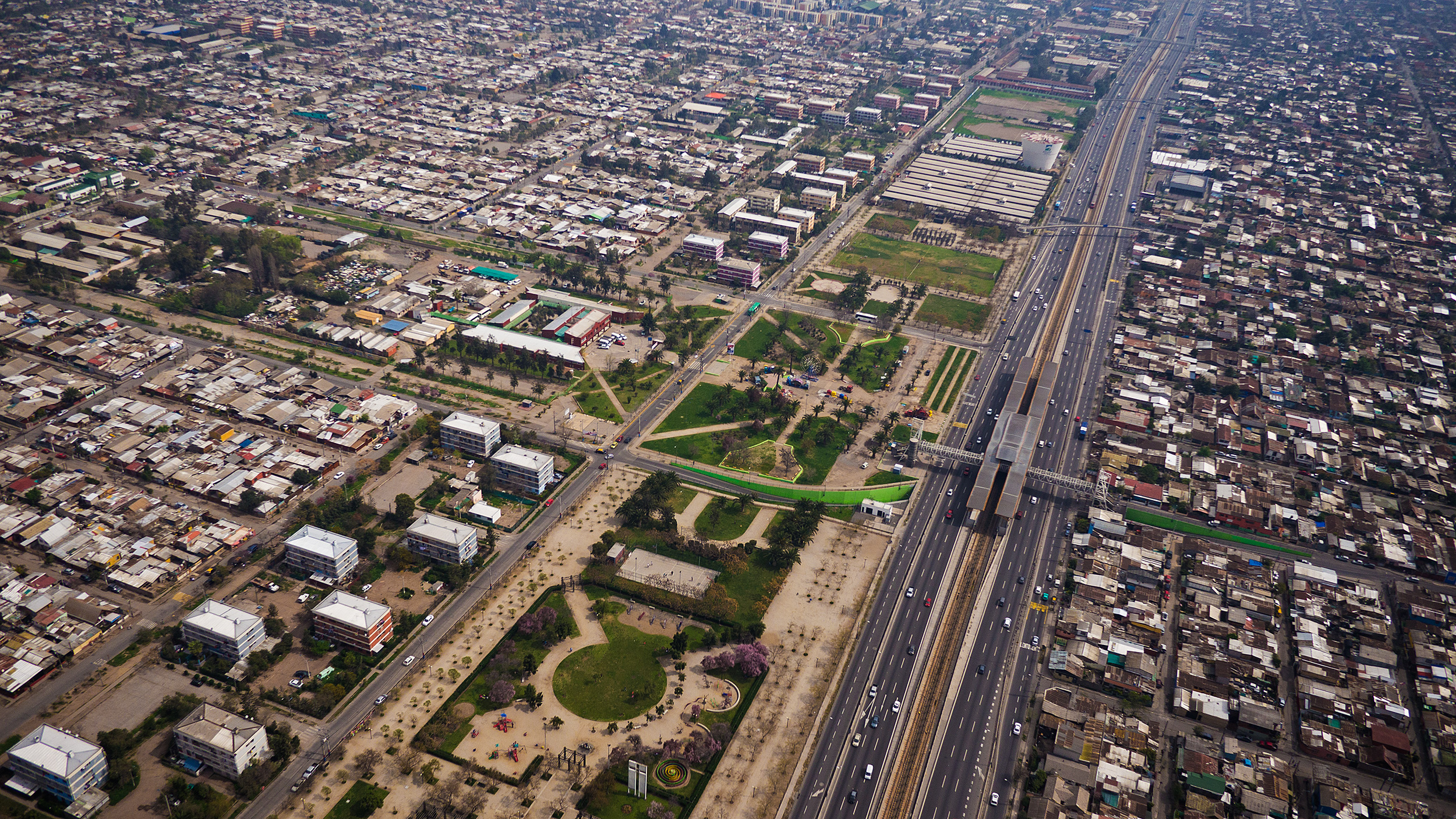 25-09-2013 Parque La Bandera